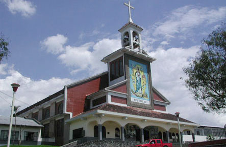 es la iglesia de macas